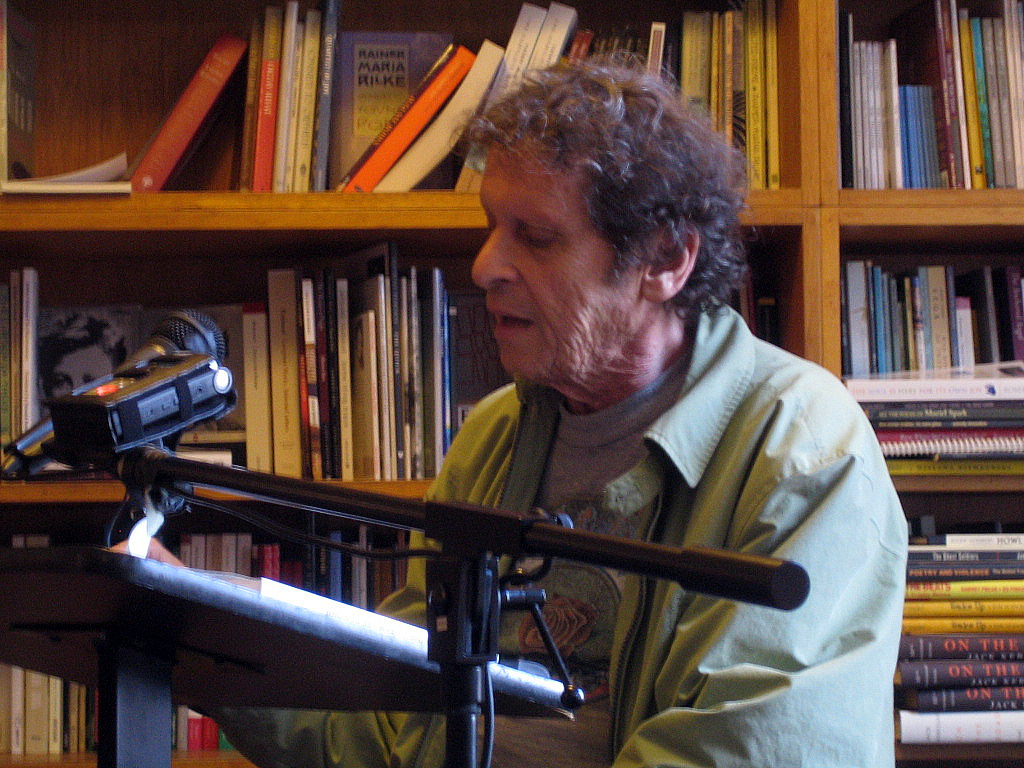 paul krassner